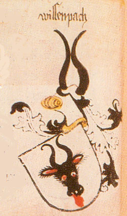 Ingeram-Codex der ehemaligen Bibliothek Cotta wissenpach freigestellt aus